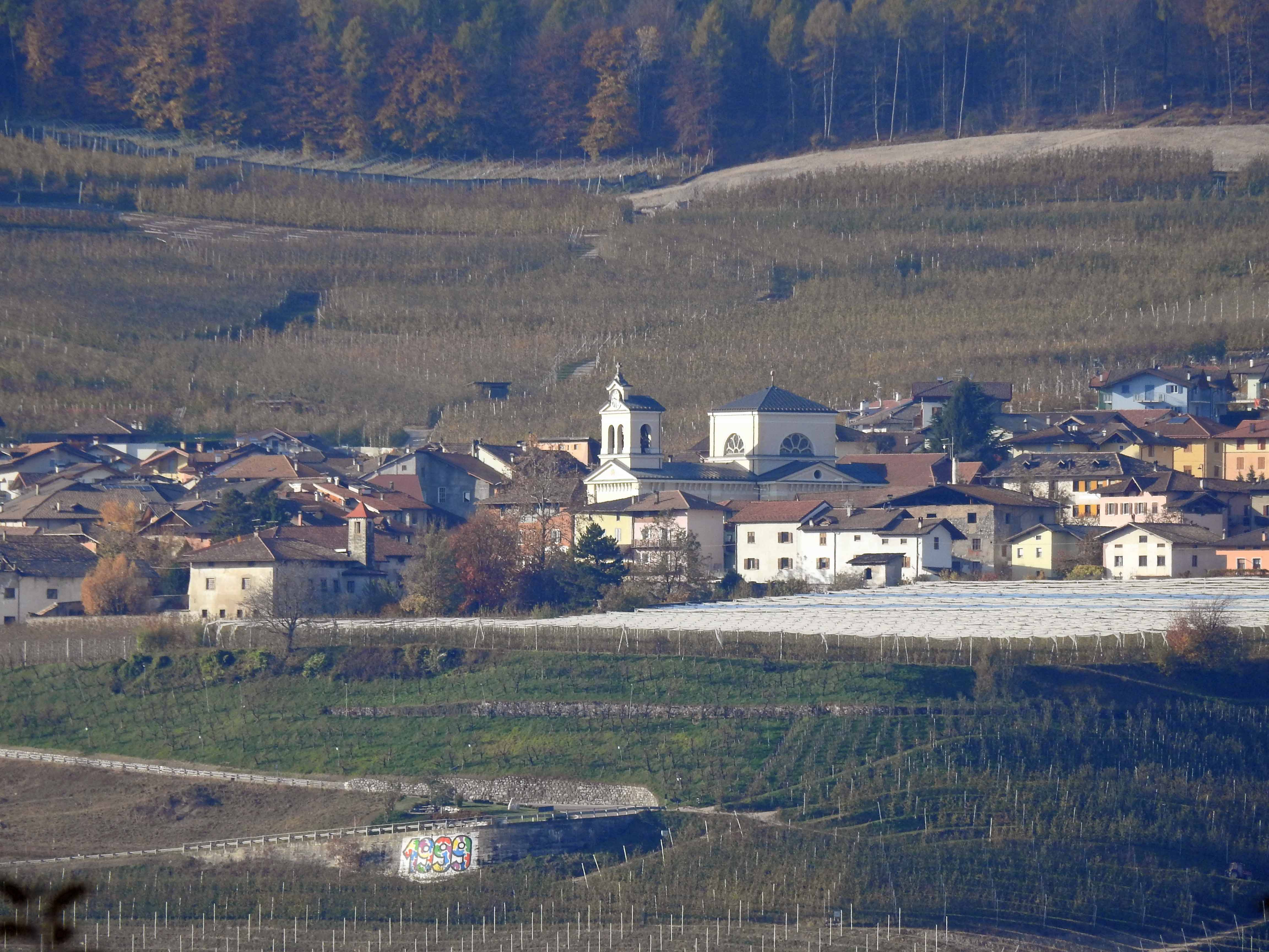 Sporminore, Trentino